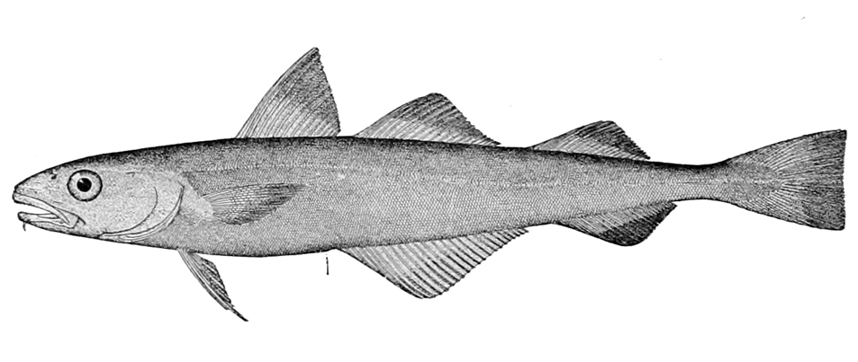 Microgadus proximus